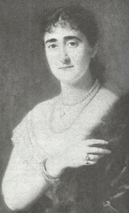 Jeugdportret van Mathilde van Limburg-Stirum (1854-1932).